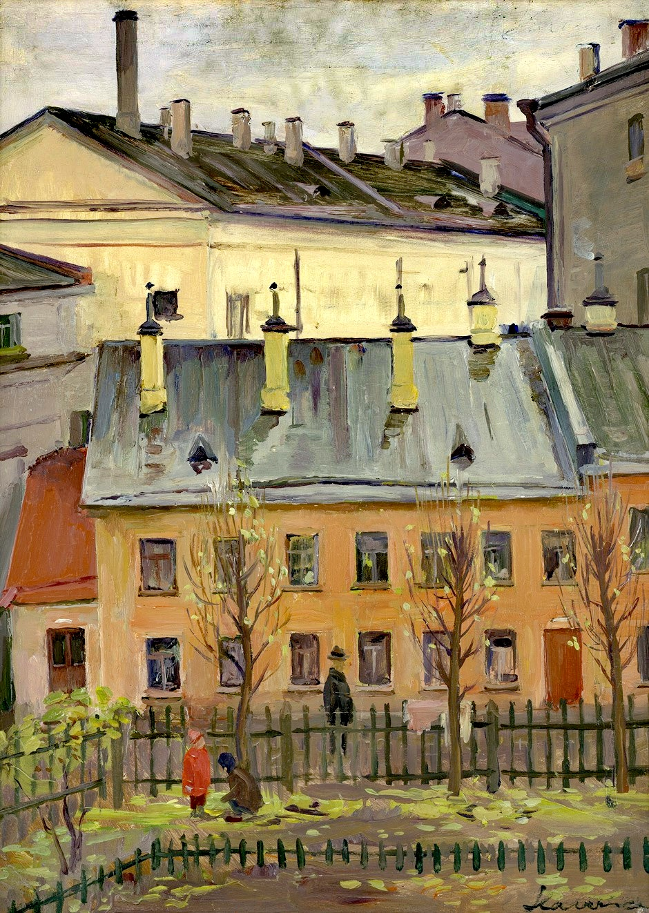 Häuser am Montmartre. Öl auf Karton. 62 x 48 cm. Unten rechts mit Pinsel in Schwarz signiert, verso unter weißer Grundierung nochmals signiert und mit der Nummer "3-8-229-184". Um 1900.